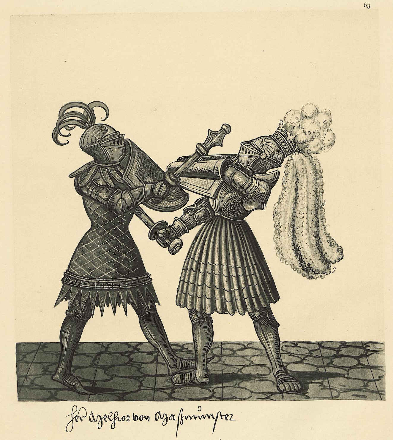 Tafel aus: Freydal: des Kaisers Maximilian I. Turniere und Mummereien; mit einer geschichtl. Einleitung. Tafeln. Wien, 1882. Exemplar der UB Tübingen. (Faksimileedition des Turnierbuchs Freydal, Kunsthistorisches Museum Wien, Signatur: K.K. 5073) Tafel 63 Herr Melichior von Massmunster